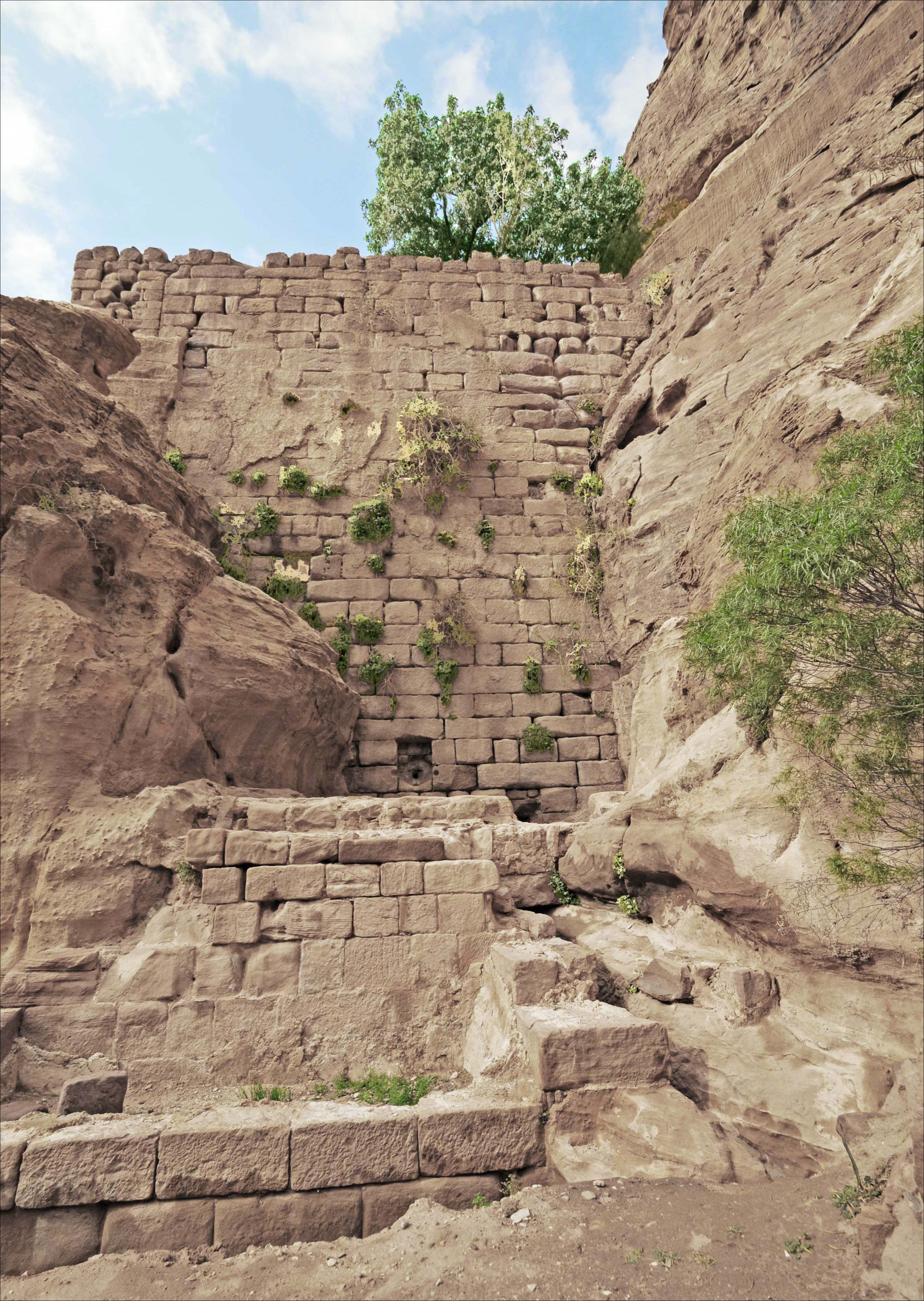 Ancien barrage à l’abandon sur un wadi à l'extérieur de Pétra.